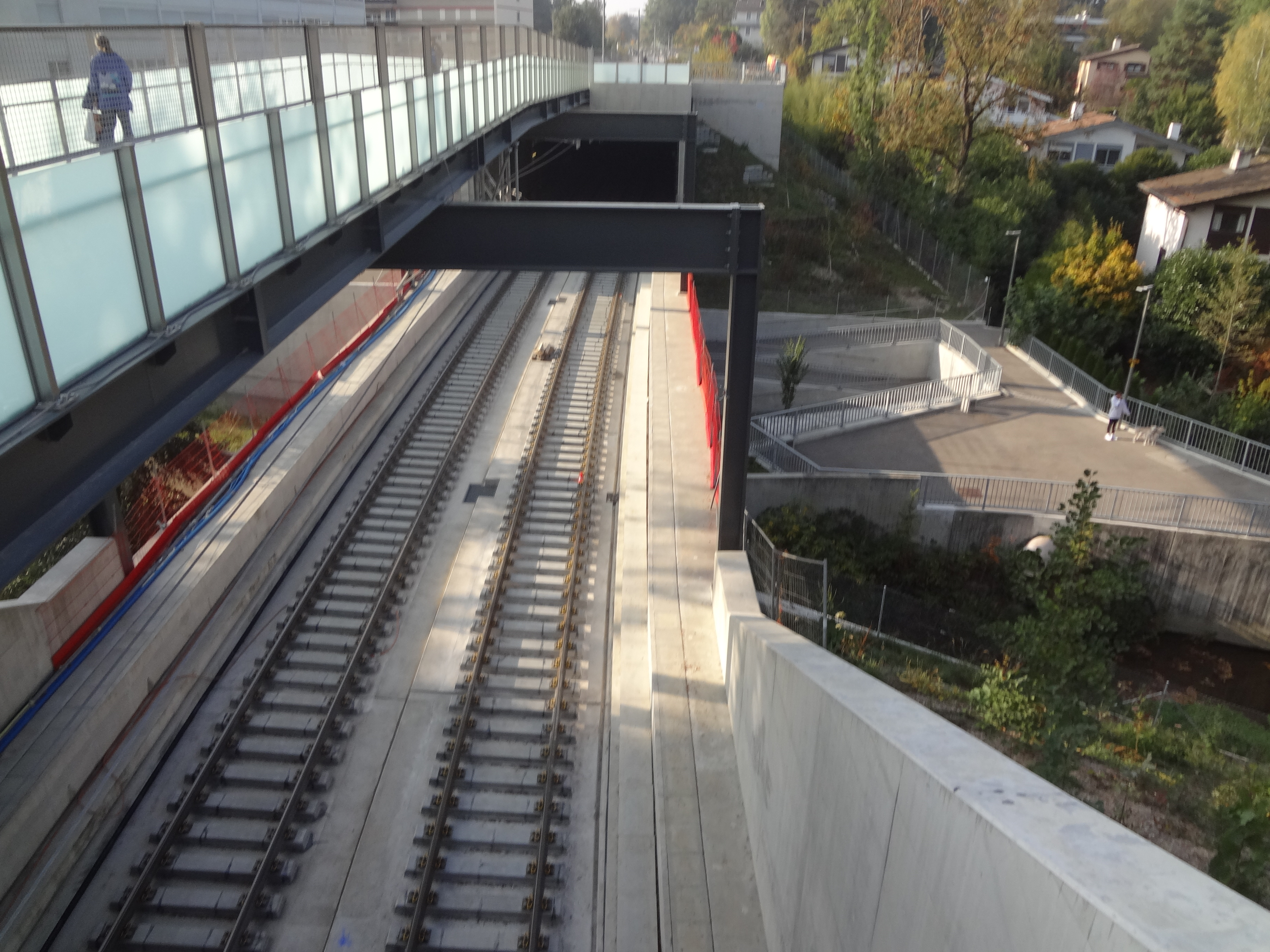 La voie verte de Chêne-Bourg aux Eaux-Vives. Pont de la voie-verte et du chemin de fer sur la Seymaz.